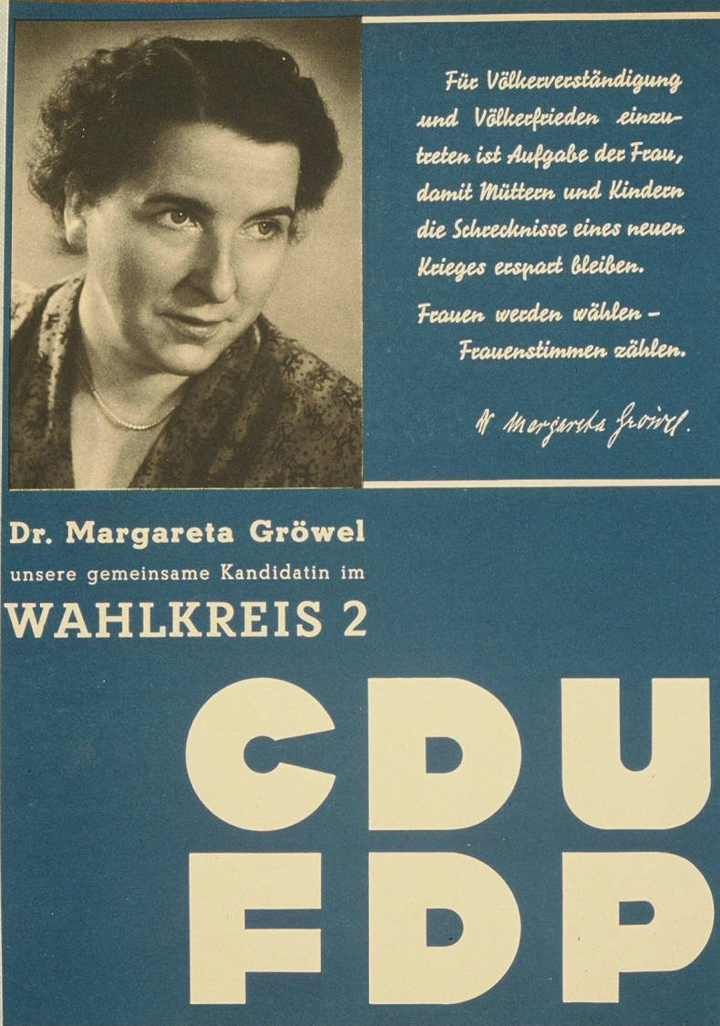 Für Völkerverständigung und Völkerfrieden einzutreten ist Aufgabe der Frau, damit Müttern und Kindern die Schrecknisse eines neuen Krieges erspart bleiben. ... Dr. Margareta Gröwel unsere gemeinsame Kandidatin im Wahlkreis 2 CDU FDP Abbildung:PorträtfotoPlakatart:Kandidaten-/Personenplakat mit PorträtObjekt-Signatur:10-001: 107Bestand:Plakate zu Bundestagswahlen (10-001)GliederungBestand10-18:Plakate zu Bundestagswahlen (10-001) » Die 1. Bundestagswahl am 14. August 1949 » CDU » Mit PorträtfotoLizenz:KAS/ACDP 10-001: 107 CC-BY-SA 3.0 DE